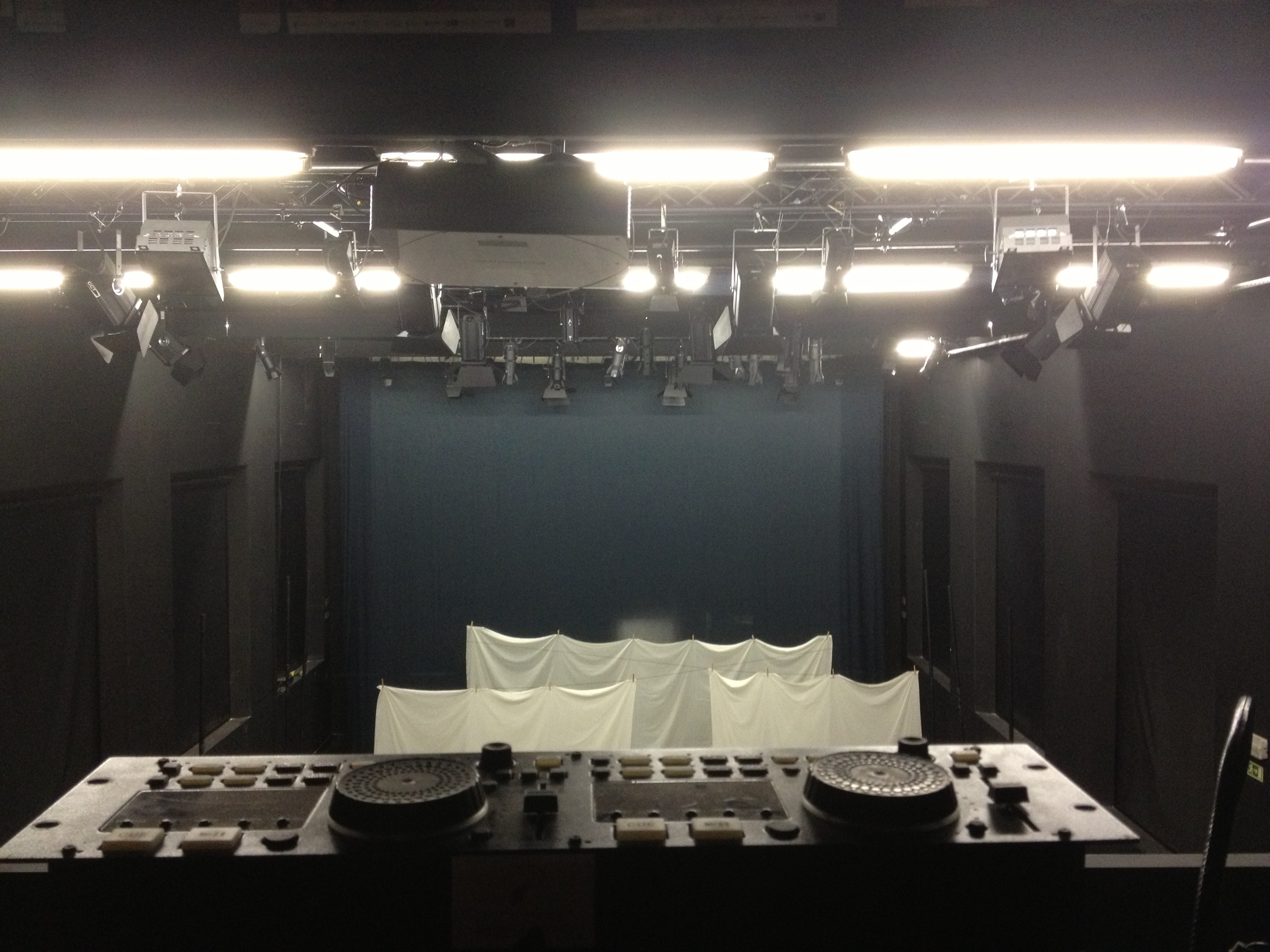 Montaje de telas de la obra Almisdaé en el Teatro da Politécnica en el marco del Festival Fatal 2013.